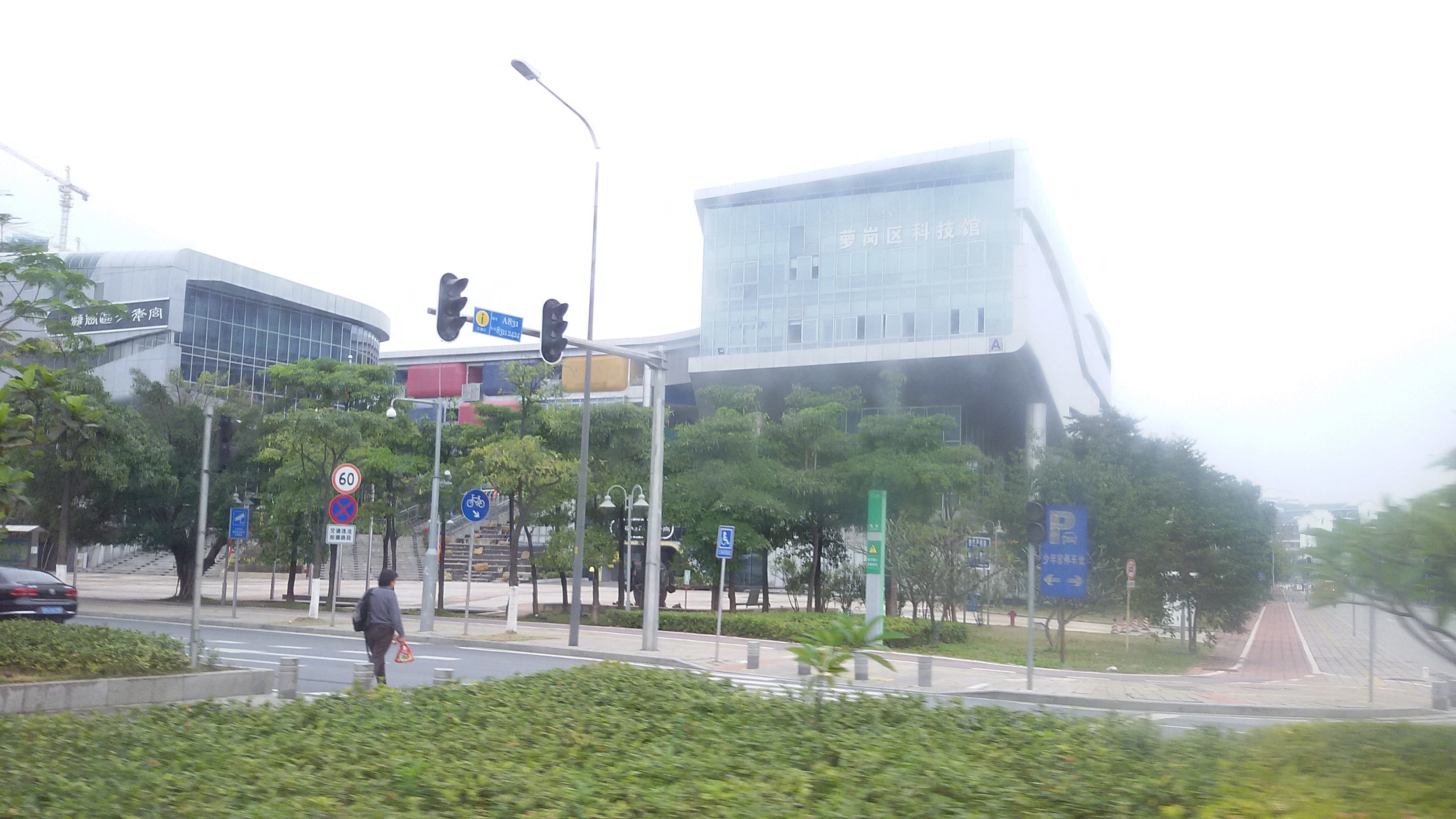 粵語: 蘿崗區少年宮